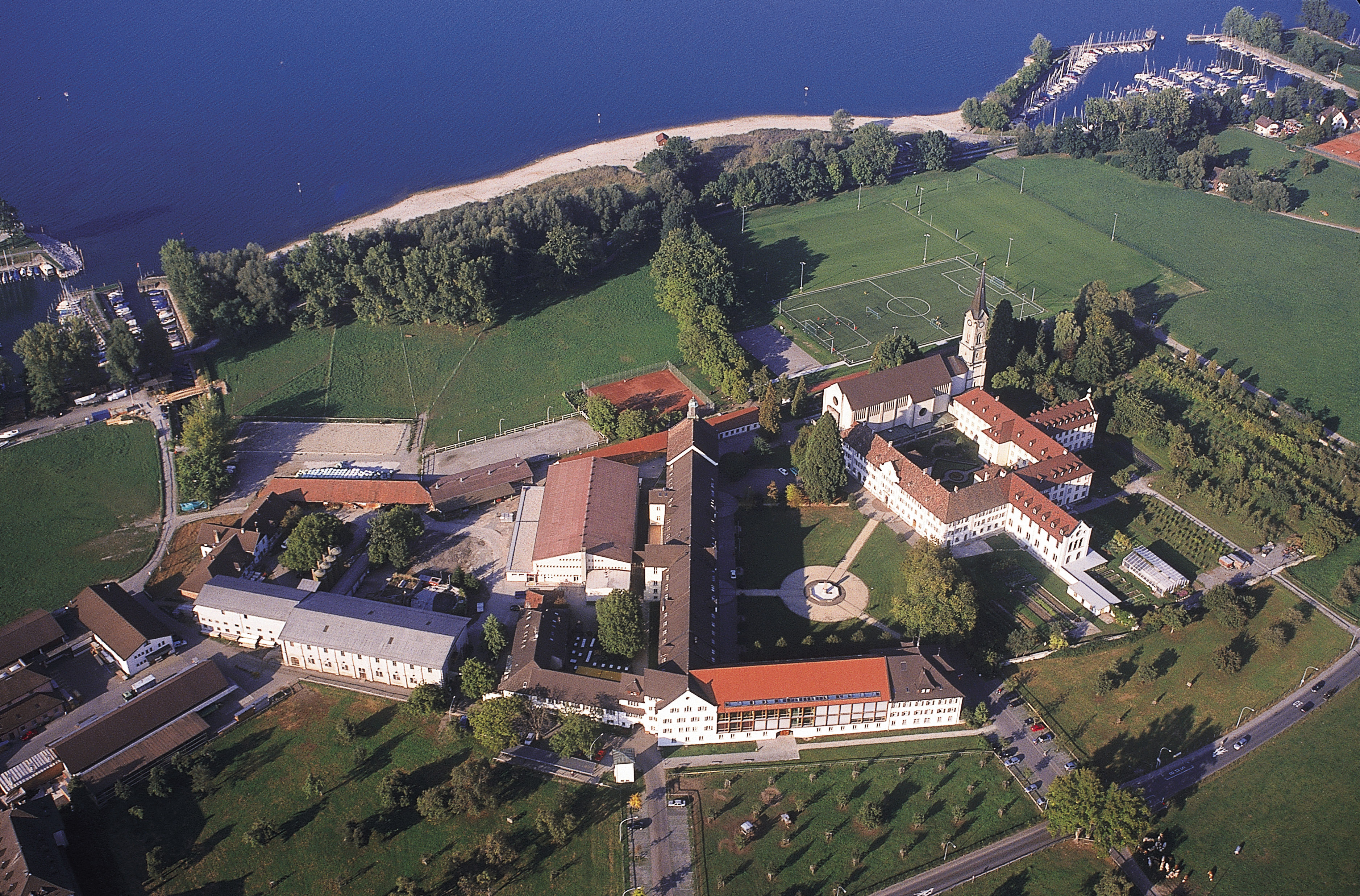 Collegium Bernardi und Zisterzienserabtei Mehrerau